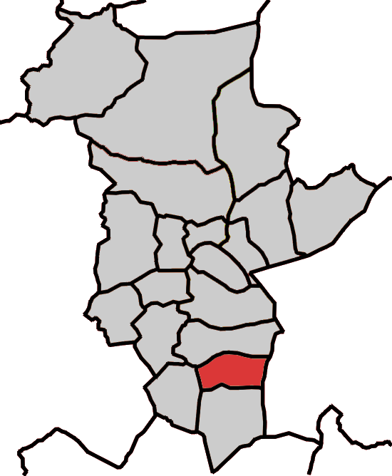 Situación da parroquia de Seivane de Vilarente no concello de Abadín